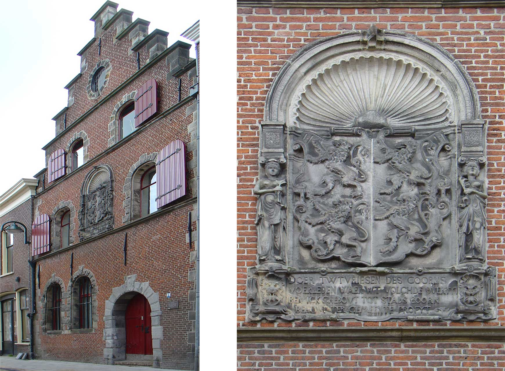 Het Edelambachtshuis in Schoonhoven